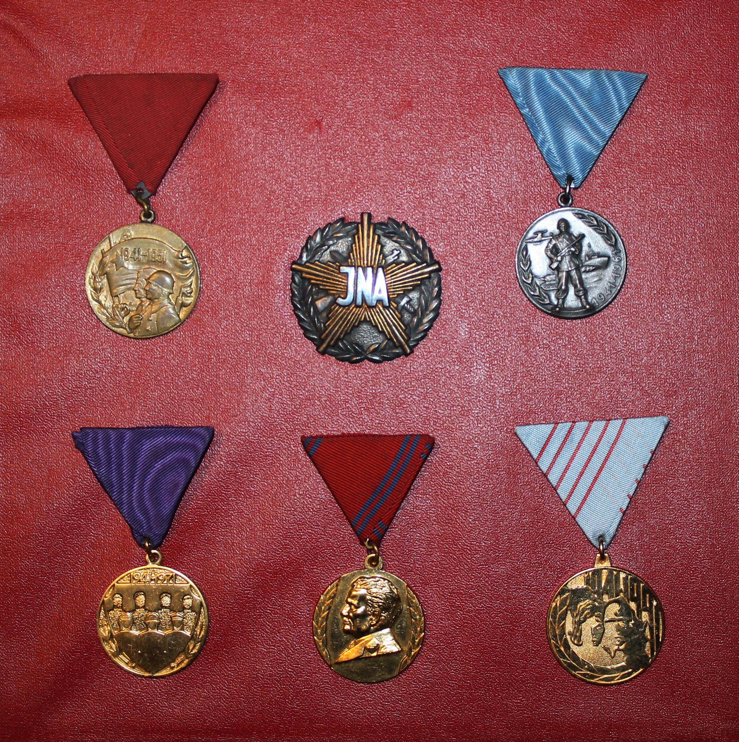 Спомен медаље ЈНА поводом 10, 20, 30, 40 и 50 годишњице ЈНА